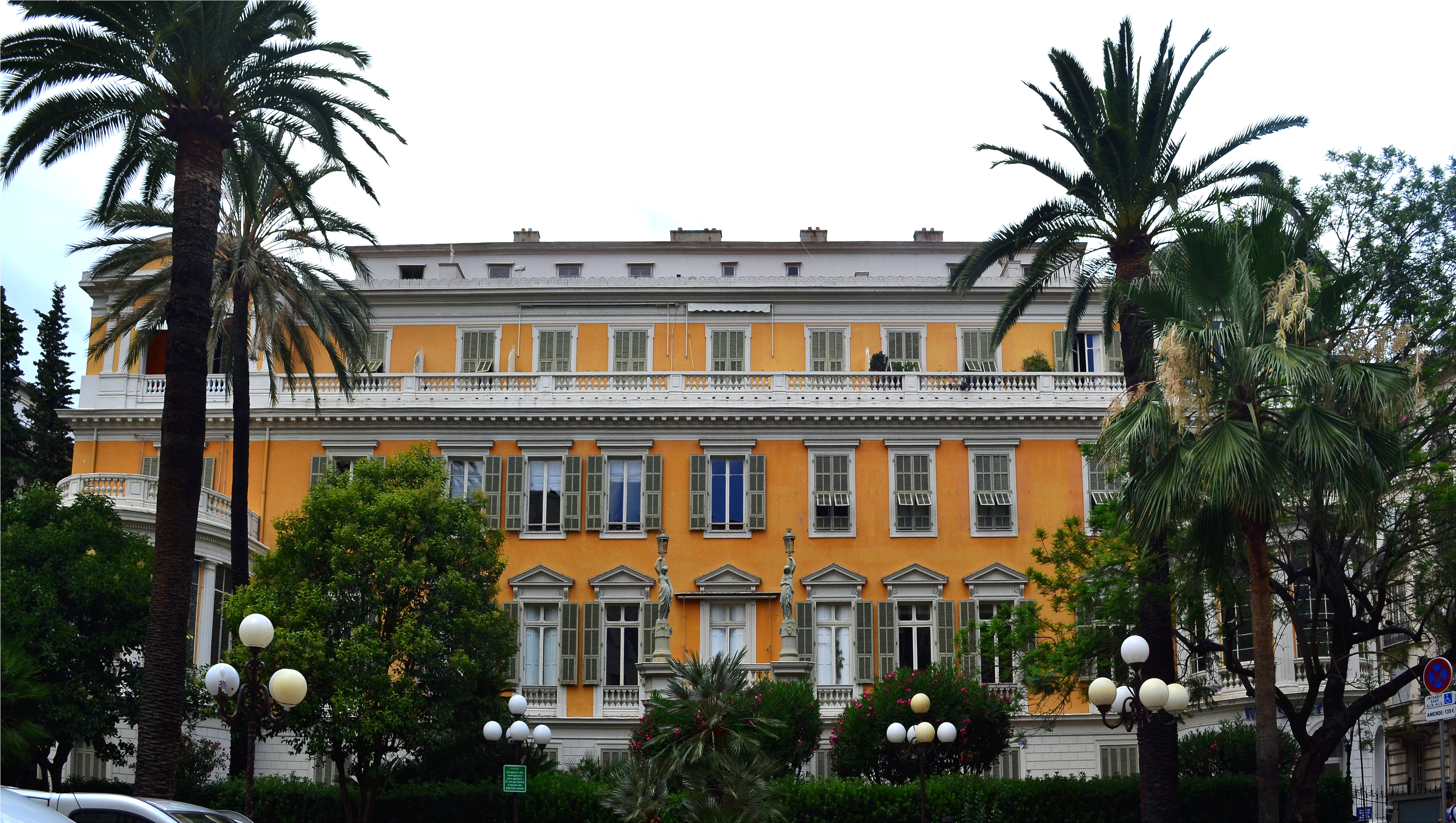 Palais Marie-Christine (Nice, France)